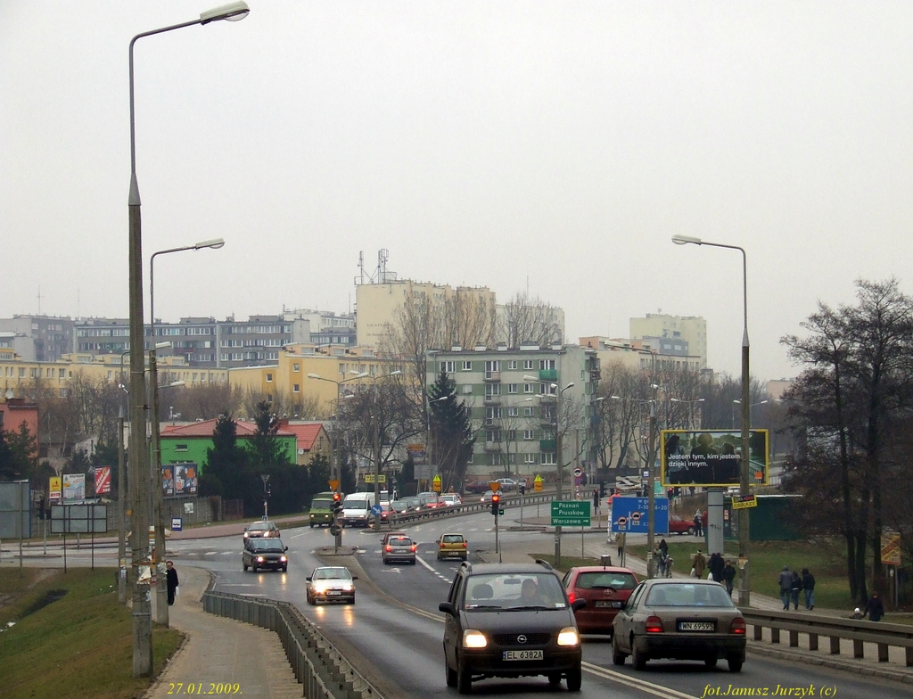 Widok z wiaduktu im. Gen. Leopolda Okulickiego w Piastowie.